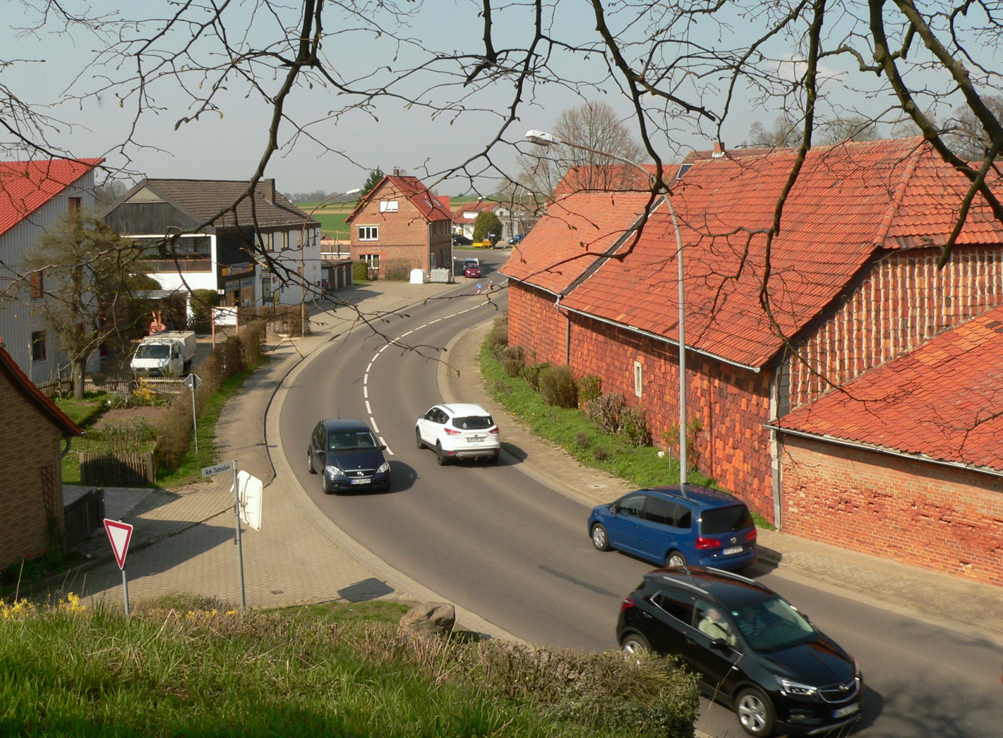 Blick vom Tumulus auf Ortsdurchfahrt von Evessen